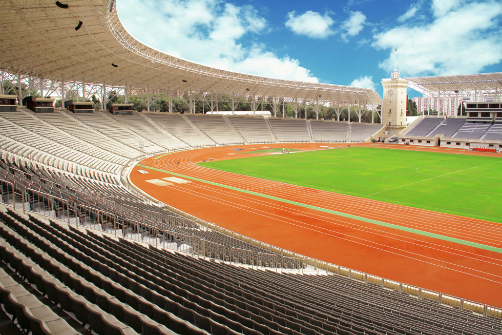 Tevfik Behramov Stadyumu